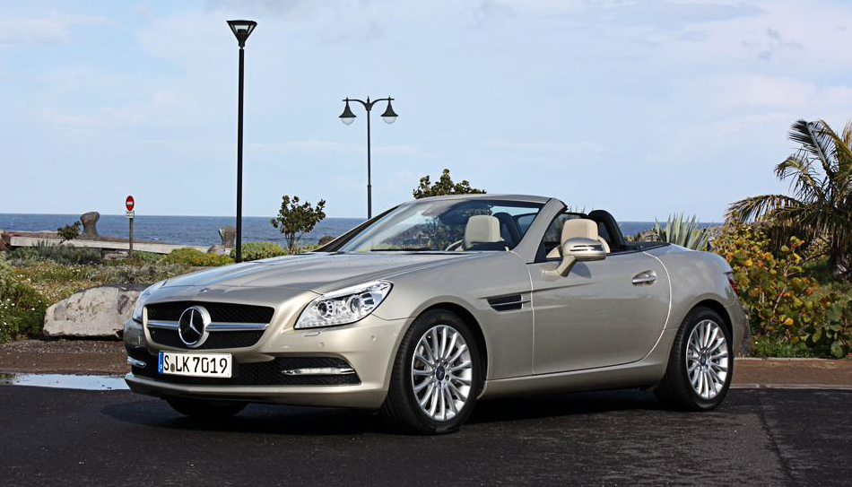 Mercedes-Benz SLK 250 BlueEFFICIENCY (R 172)